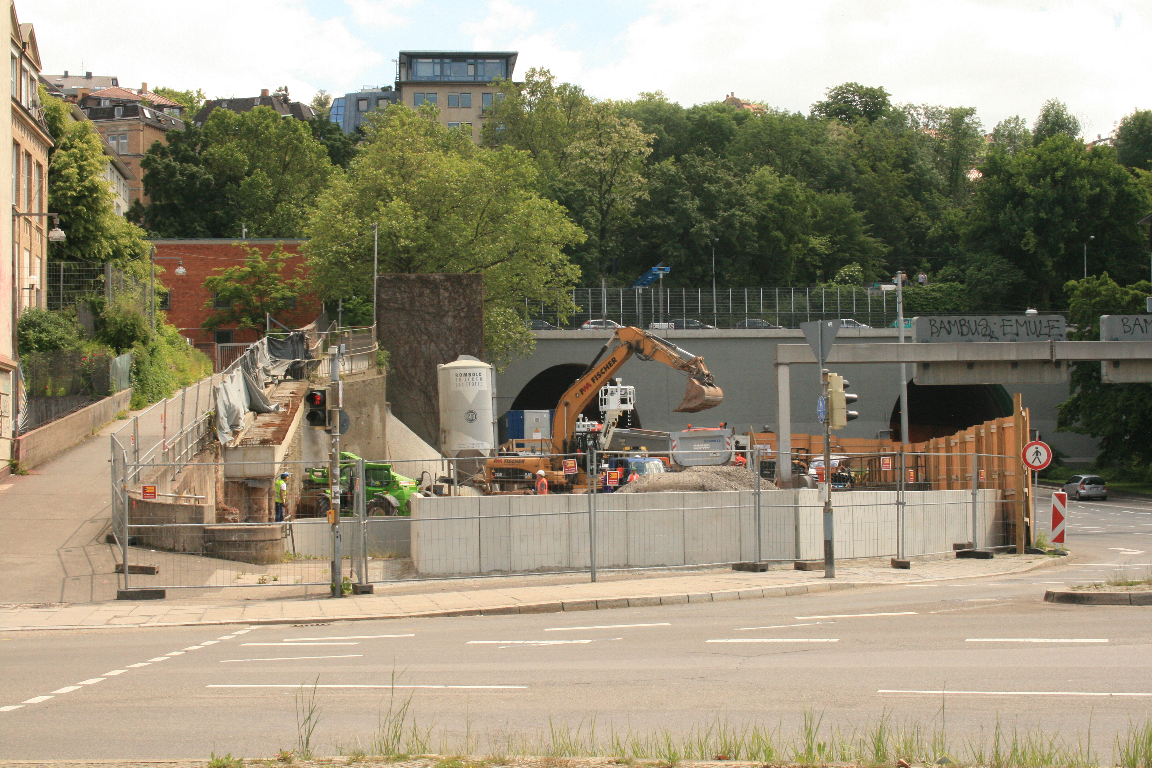 Vorbereitende Bauarbeiten für den Fildertunnel am Nordportal des Wagenburgtunnels.